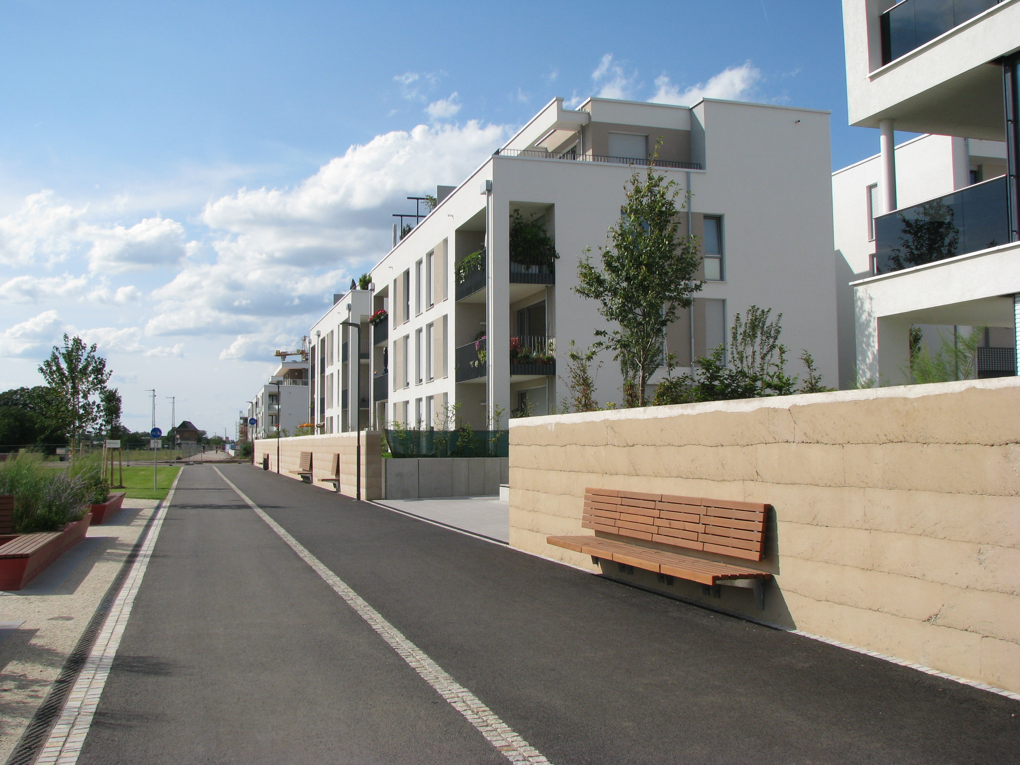 Die Promenade am Rand der Heidelberger Bahnstadt